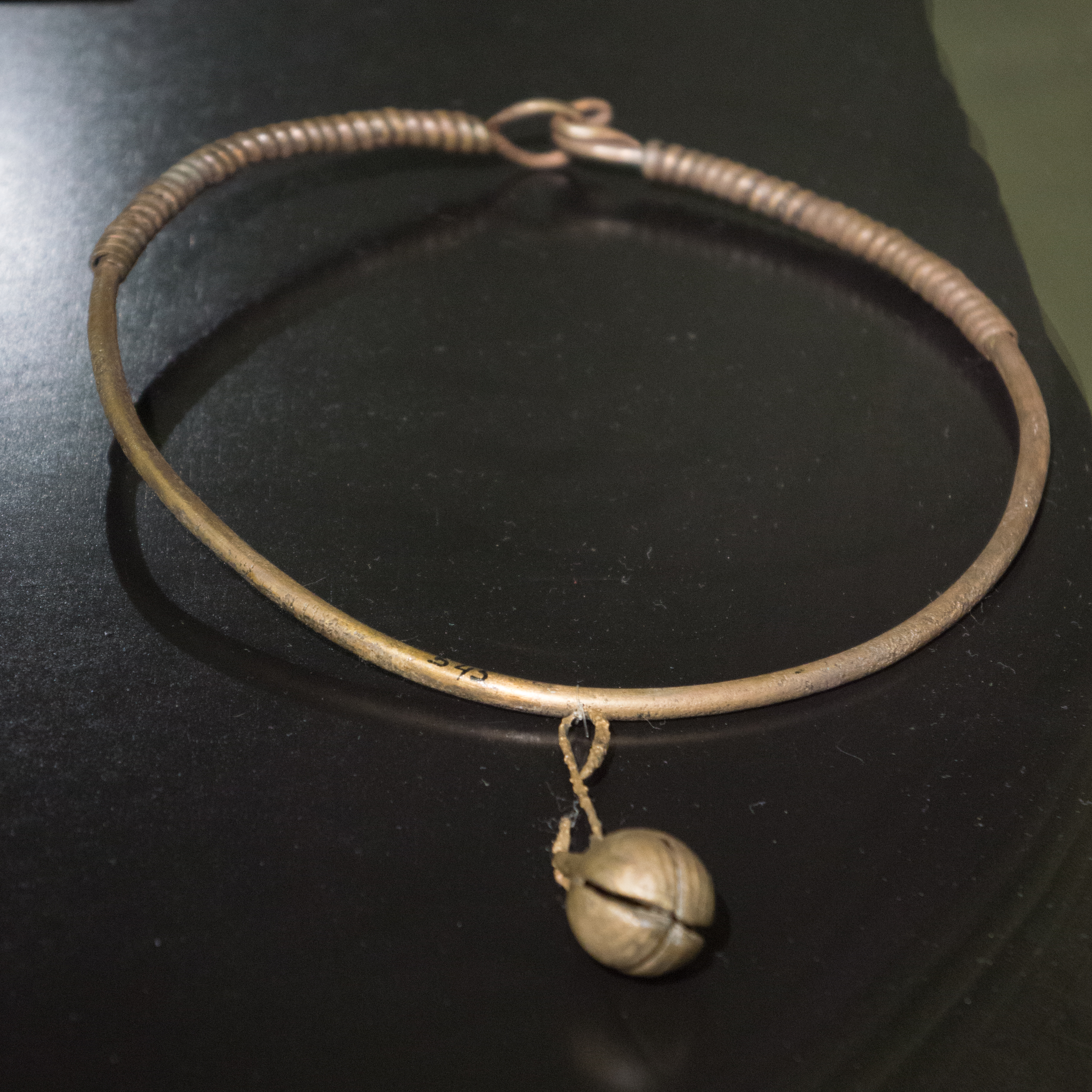 Torque, 7e à 8e siècle, Koman. Musée archéologique de Tirana.